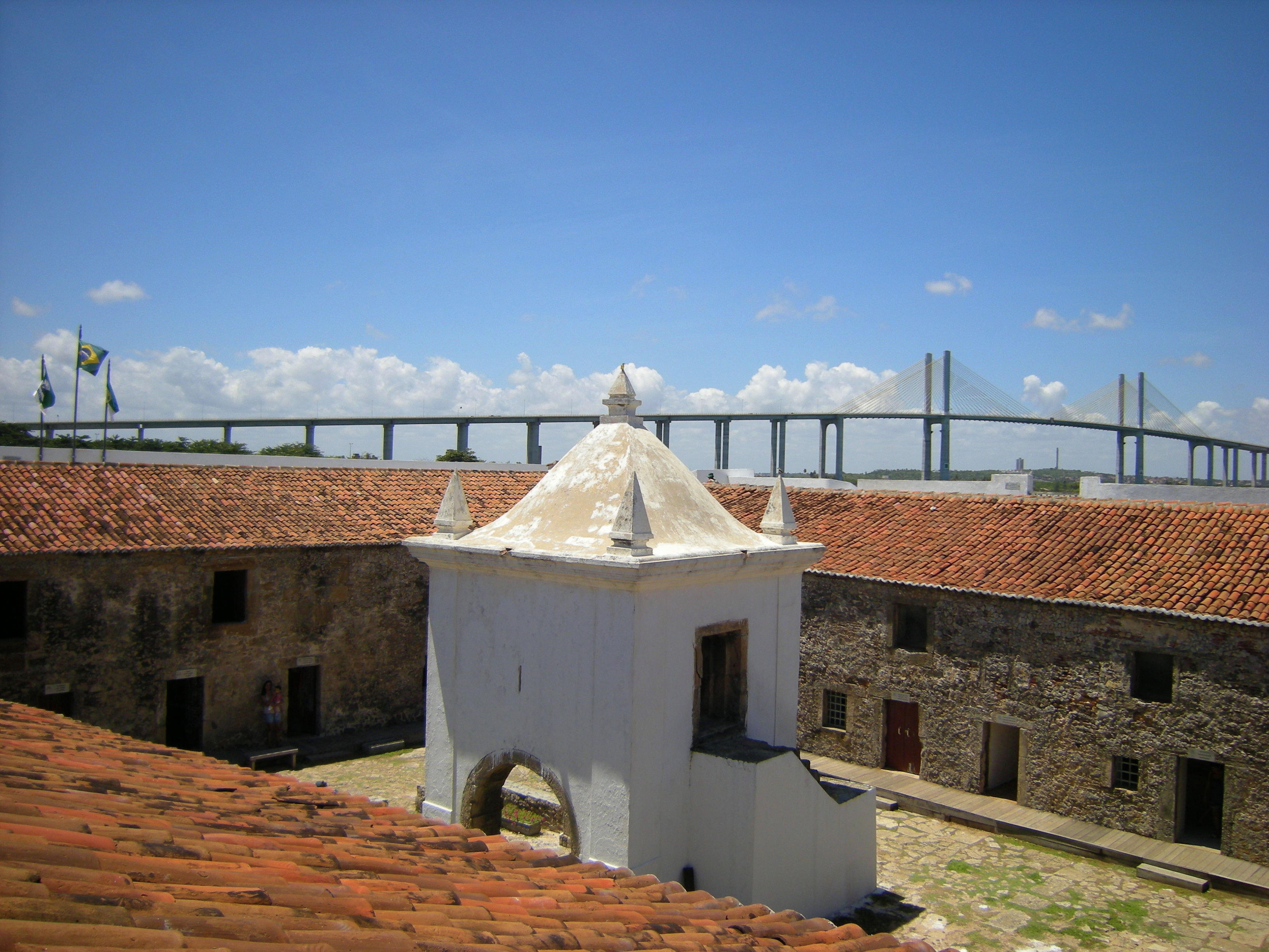 Ponte Newton Navarro vista da Fortaleza dos Reis Magos, Natal (RN), Brazil.